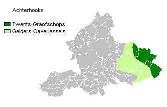 Made by nds-Gebruker:Grönneger 1